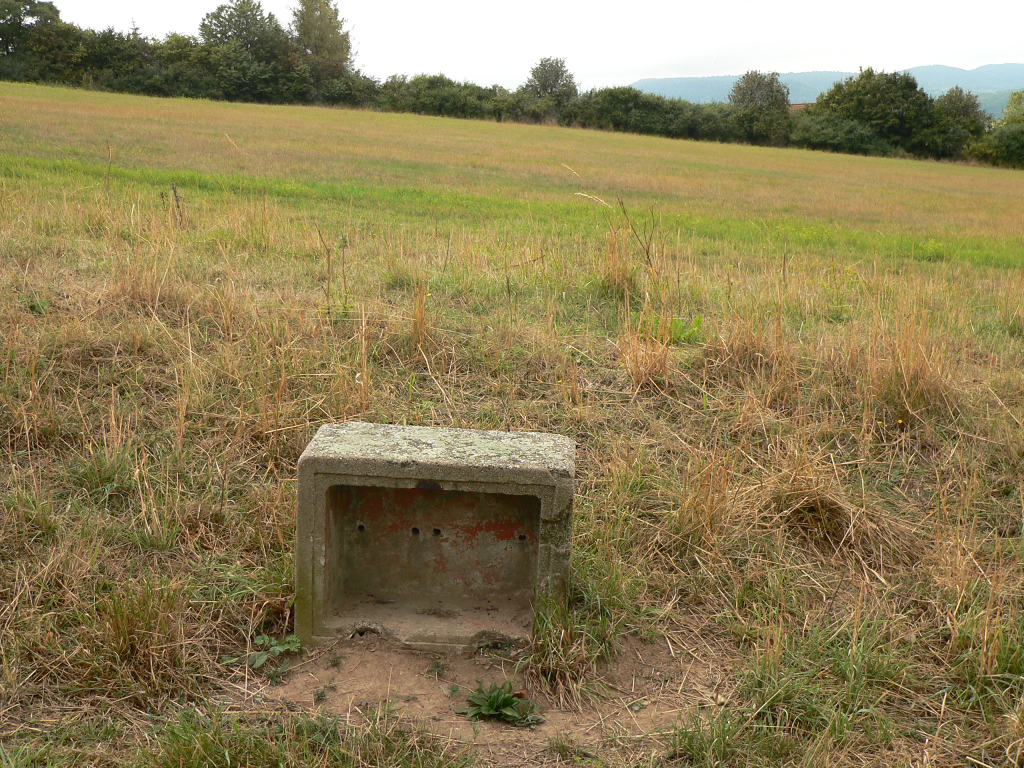 Früherer Verteilerkasten am erhöhten Mittelweg, damals als "Führerweg" bezeichnet, auf dem Gelände der Reichserntedankfeste